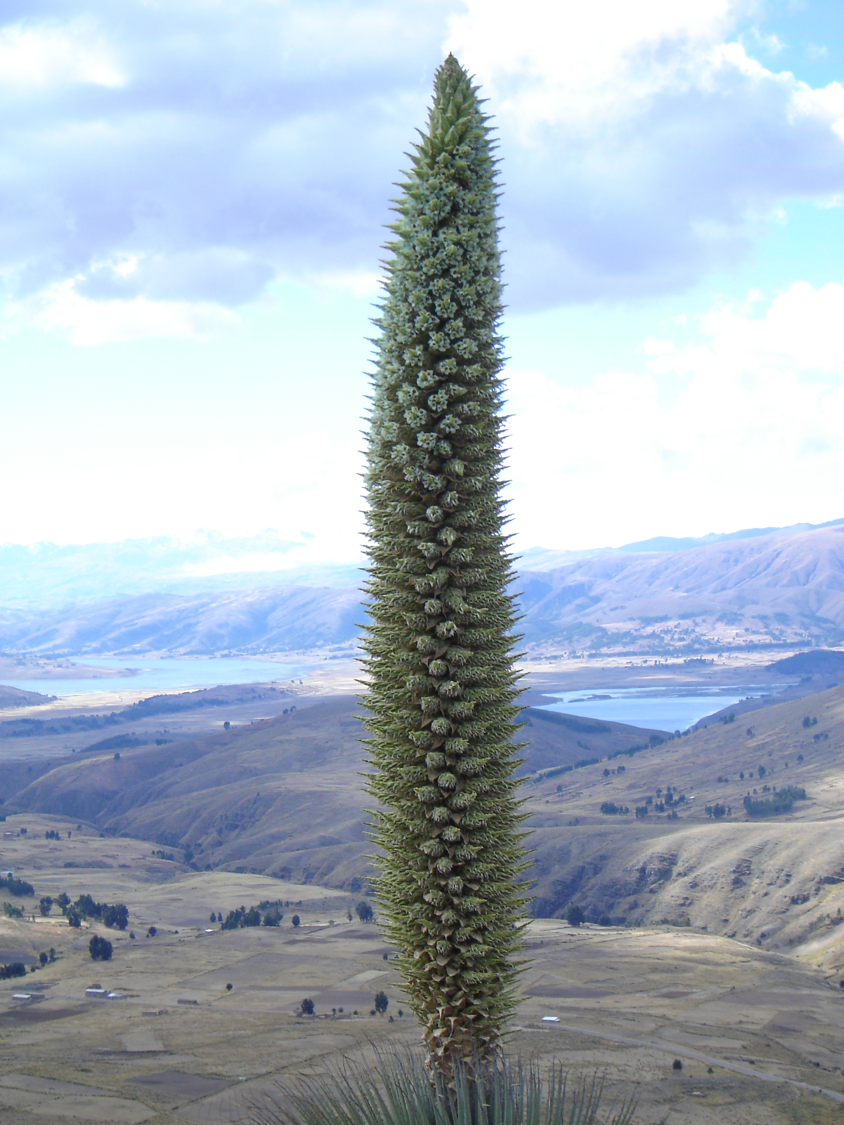 Runa Simi: Chukiqayara mallki Khurupampa urqupi, Wak'as munisipyupi, Wuliwya suyupi.